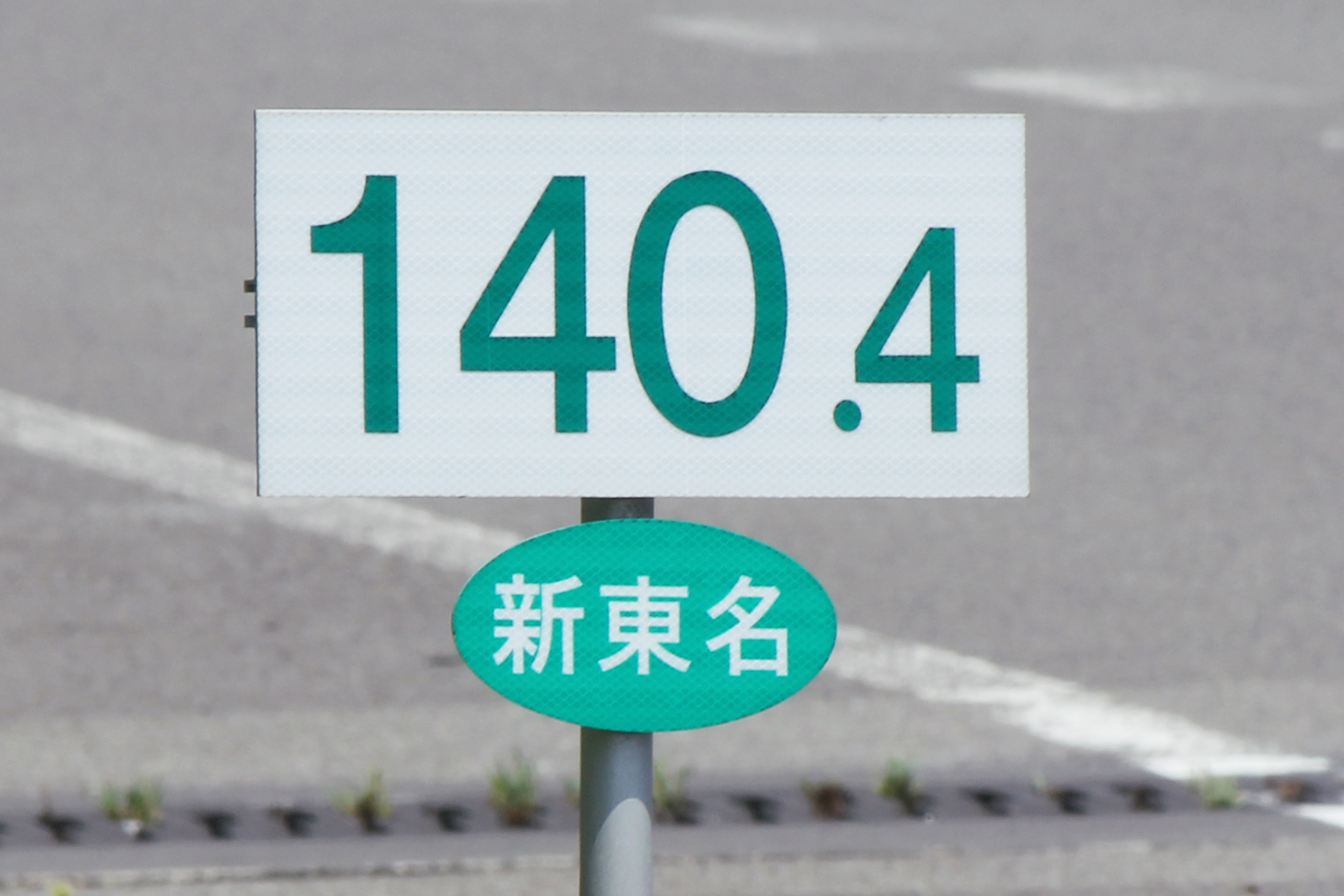 E1A新東名高速道路のキロポスト（上り藤枝PA）